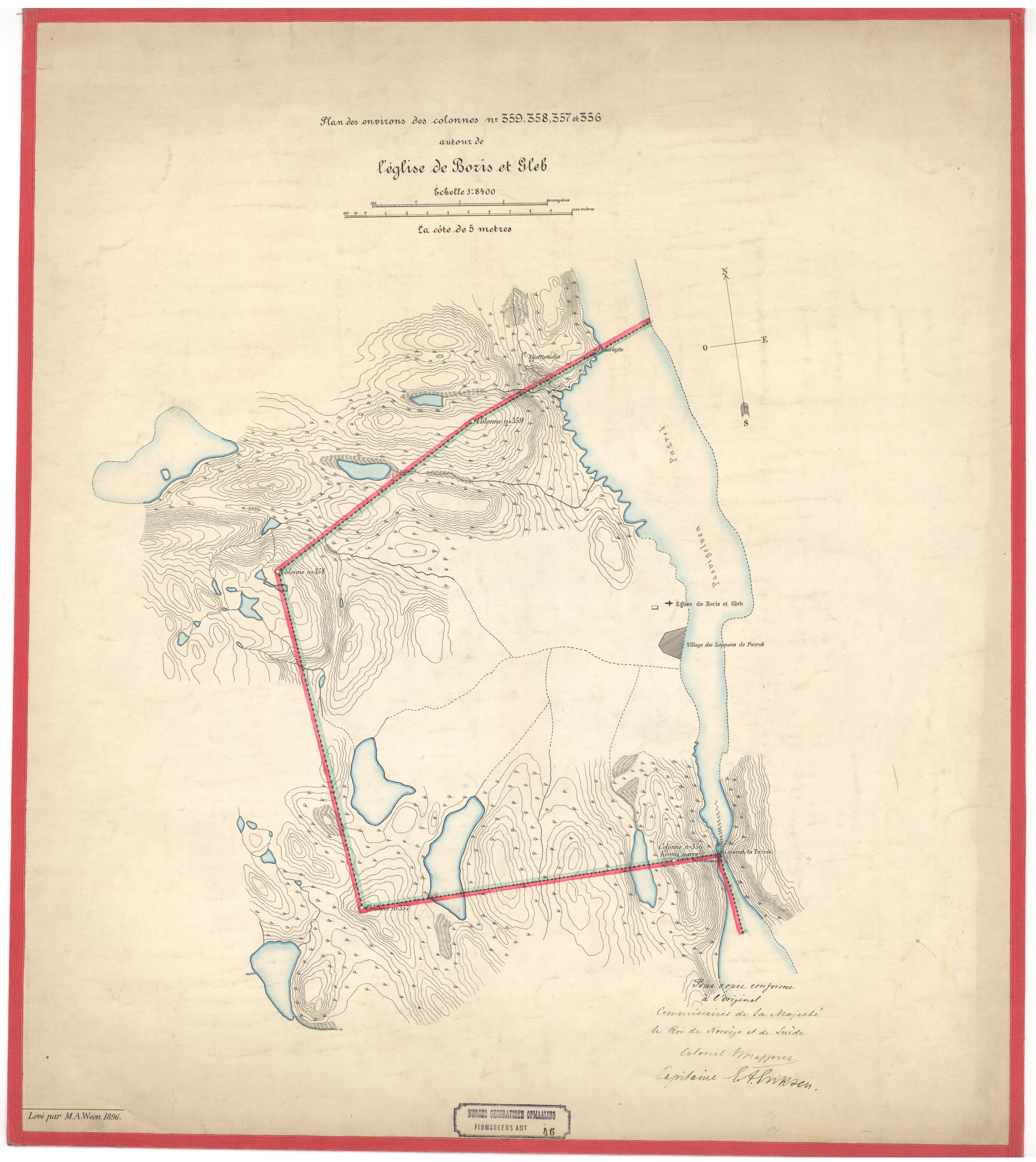 Håndtegnet/fotoalgrafi